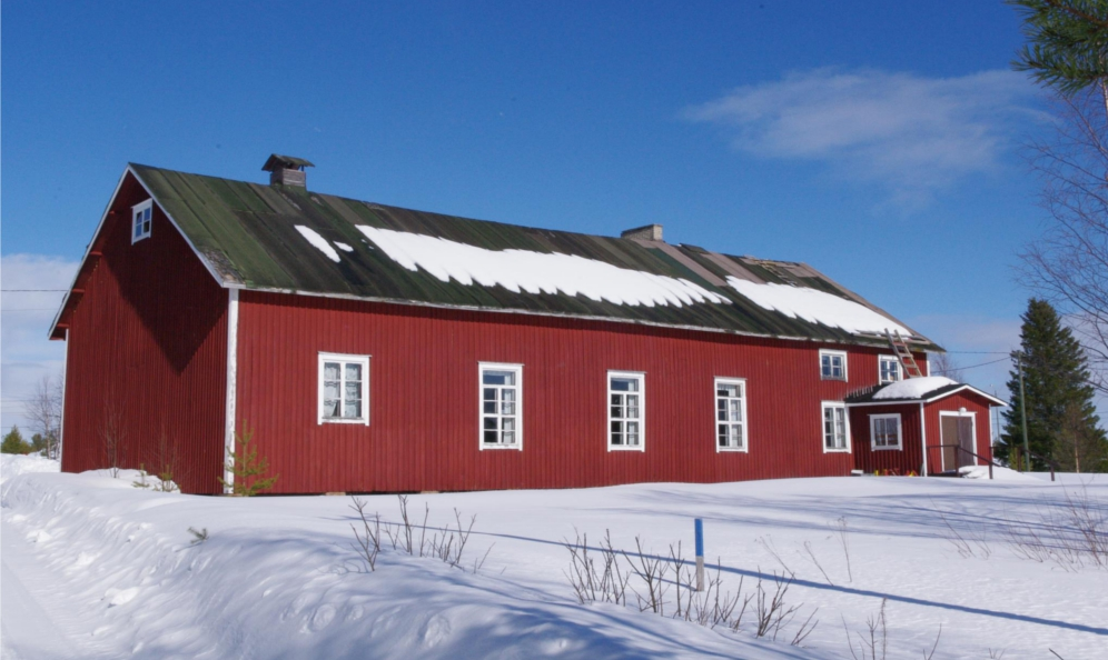 Kursun kylätalo